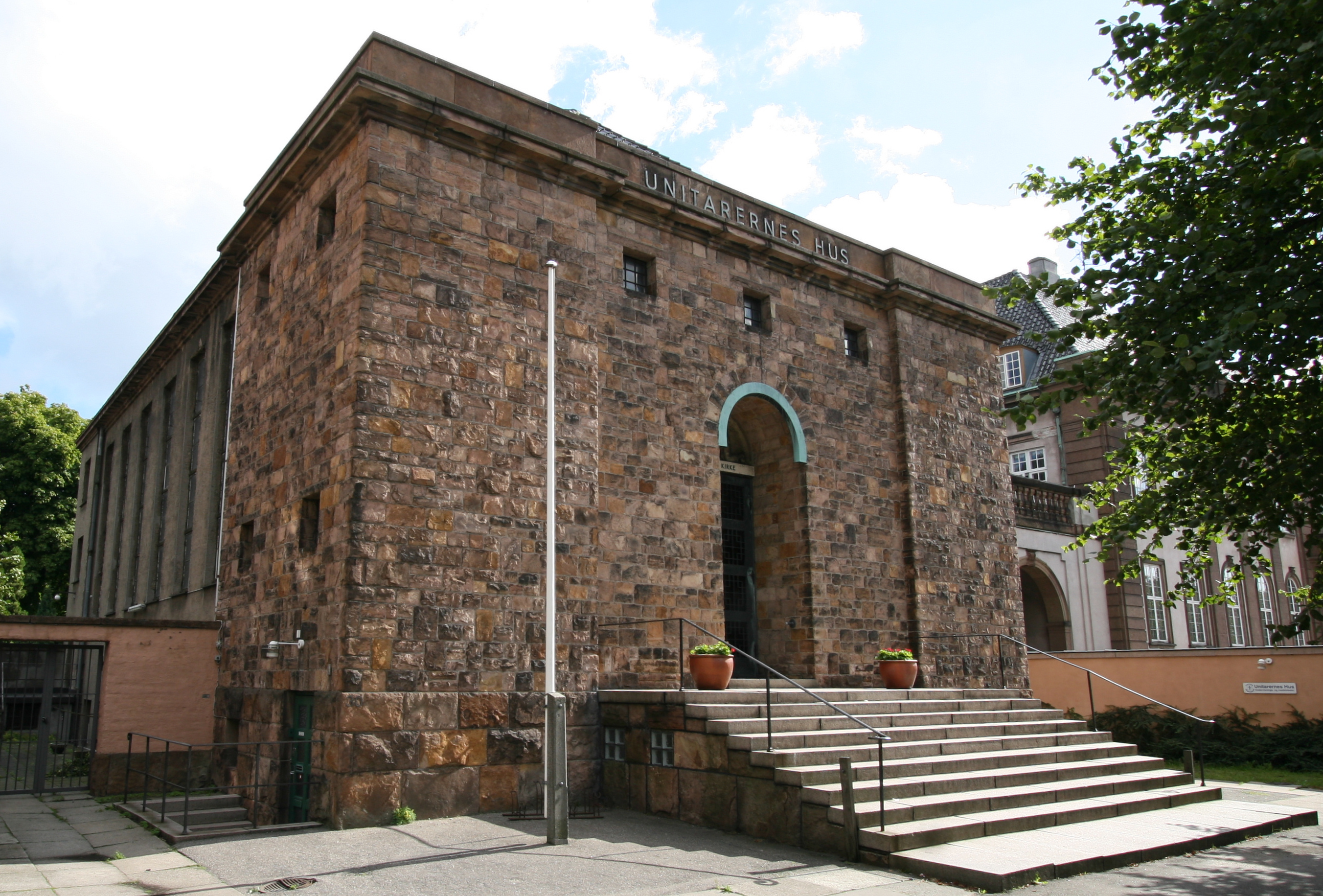 Unitarernes Hus in Copenhagen, Denmark.